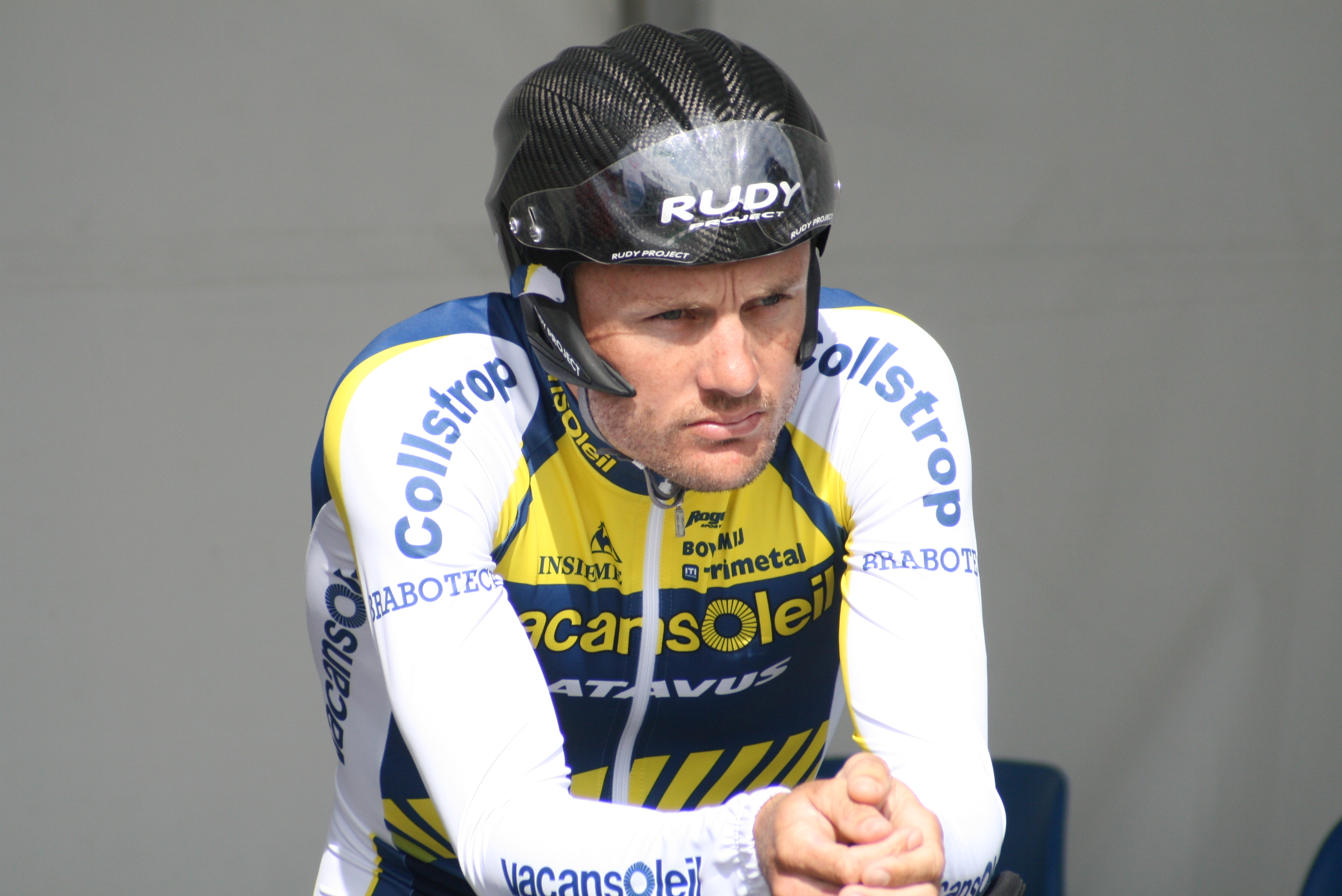 Baden Cooke, lors des Quatre jours de Dunkerque 2009